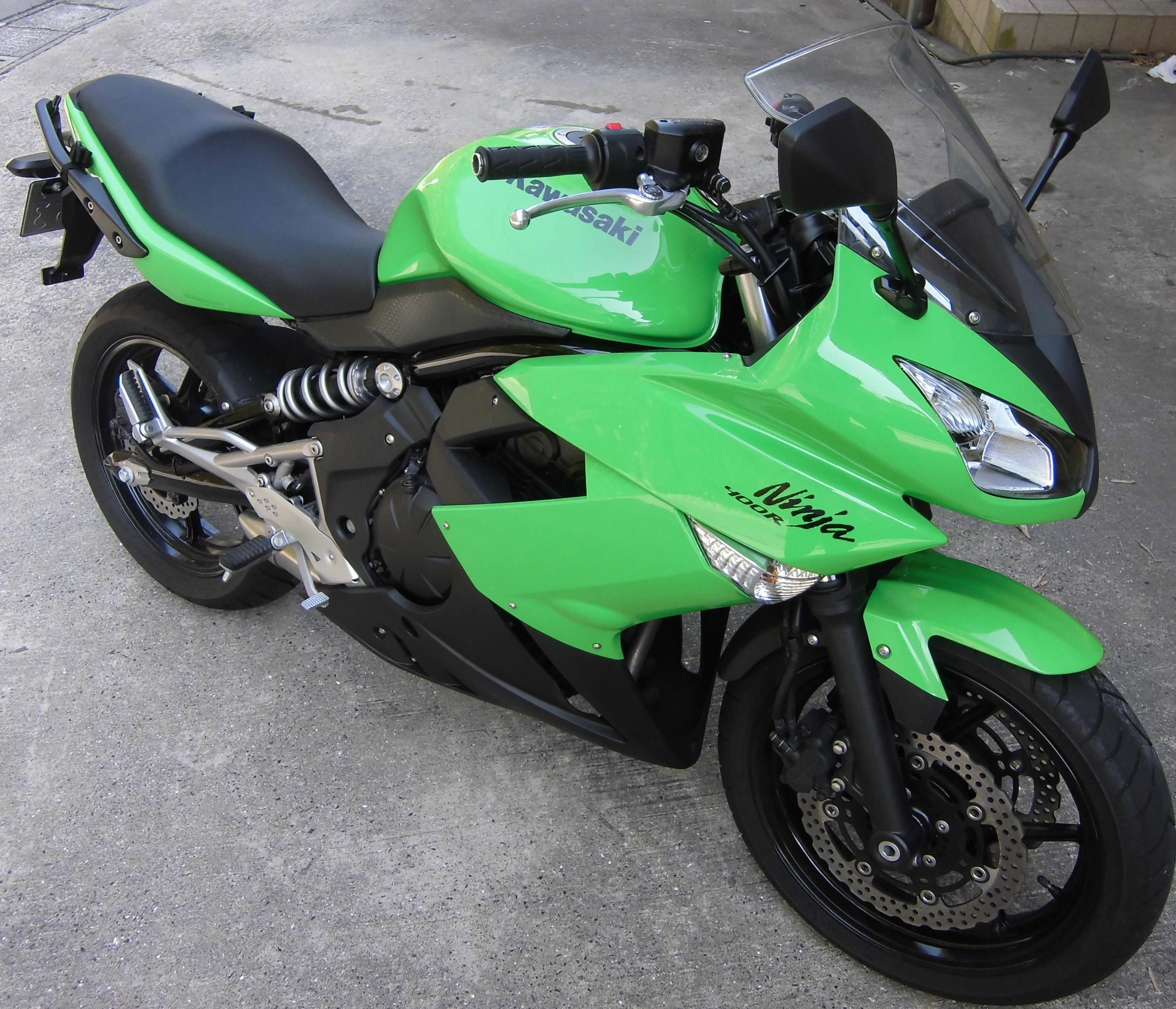 NINJA 400R